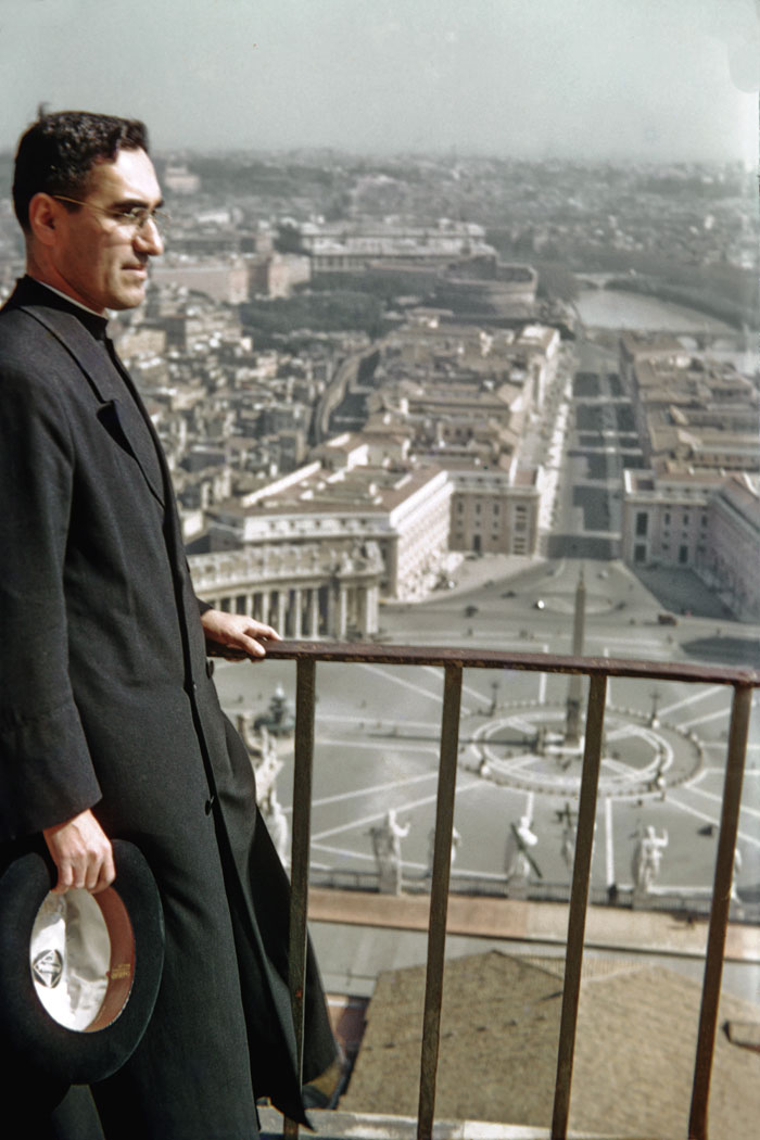 Óscar Romero poco antes de abandonar Roma.